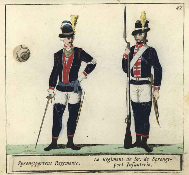 Sprengtportens regementes uniform m/1779, ur C. G. Roos samling.